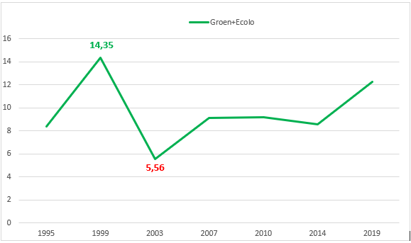 Évolution des résultats électoraux des partis sociaux-chrétiens